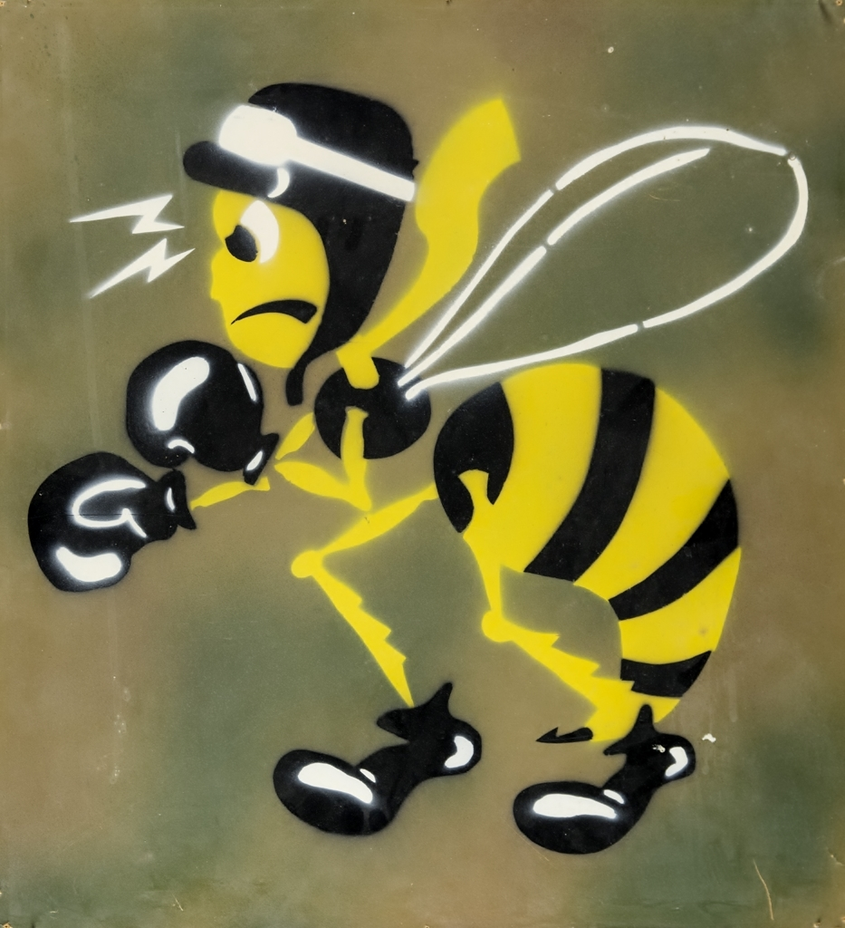 Divisionsemblem för Ivar Gul, den tredje divisionen vid Göta flygflottilj (F 9), valde ett märke utifrån en tävling med avsikten att skapa ett emblem till F 9 och deras tredje division. En då 19 år ung man vid namn Lars-Erik Johansson från västsvenska Alingsås ställde upp i tävlingen 1942 och vann med sitt bidrag. Det var en geting iklädd flygarhuva och utrustad med boxhandskar, och märket kom att bli ett av de mer kända i det Svenska Flygvapnet. Lars-Erik blev sedan mer känd i sin hemstad under namnet Sko-Lasse eftersom han startade och under lång tid drev en skoaffär i Alingsås. 1977 gick Sko-Lasse ur tiden men hans skapelse lever på något vis kvar än, även om inte divisionen är aktiv längre så finns märket med som ett av de populäraste genom tiderna.